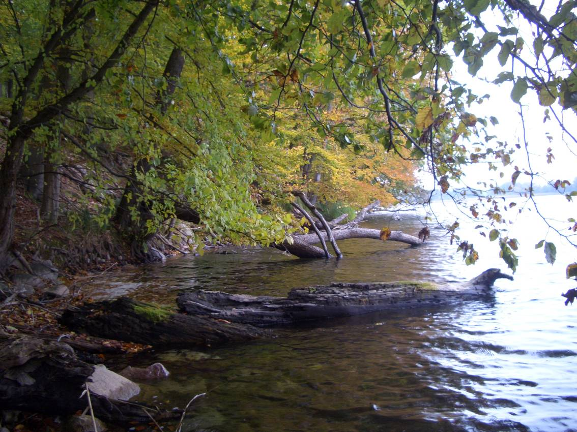 Conower Werder im Carwitzer See, Mecklenburg-Vorpommern.